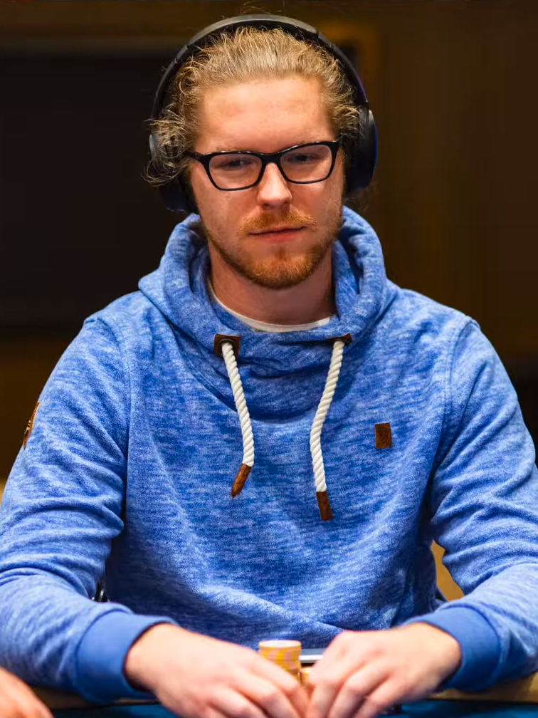 Paul Höfer bei der WPT Gardens Poker Championship